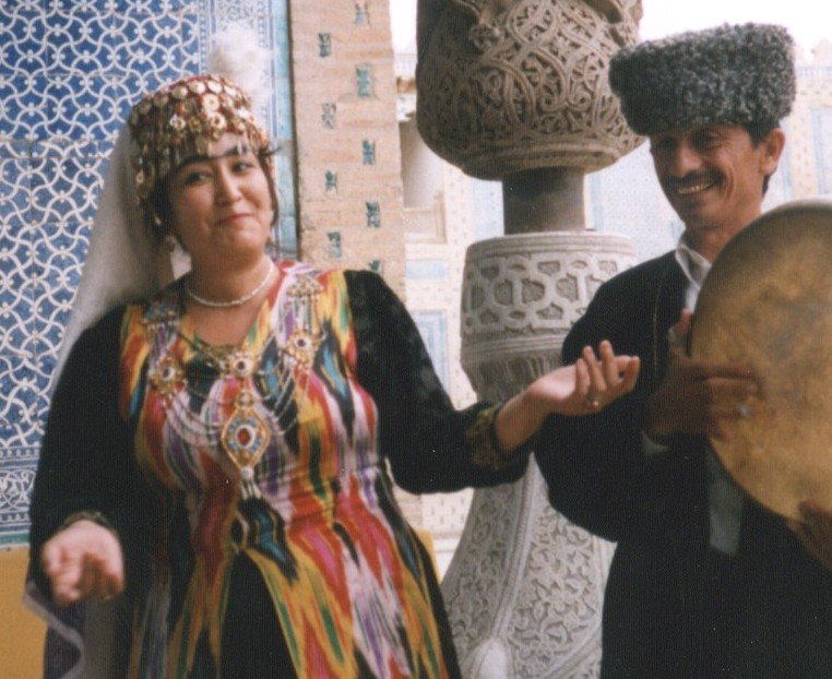 persona foto nekopirajta